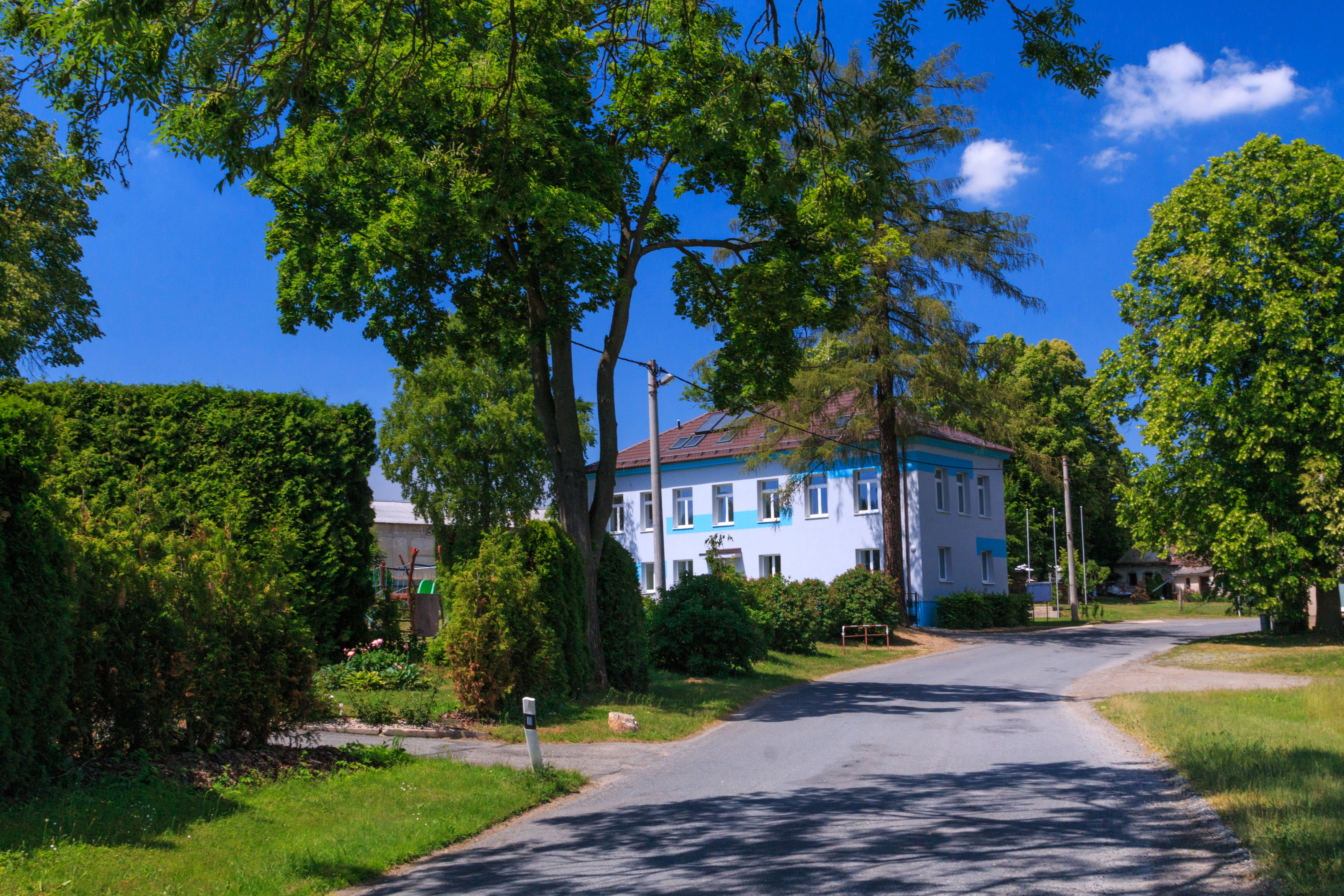 Stašov - obecní úřad Project: Vodstvo.